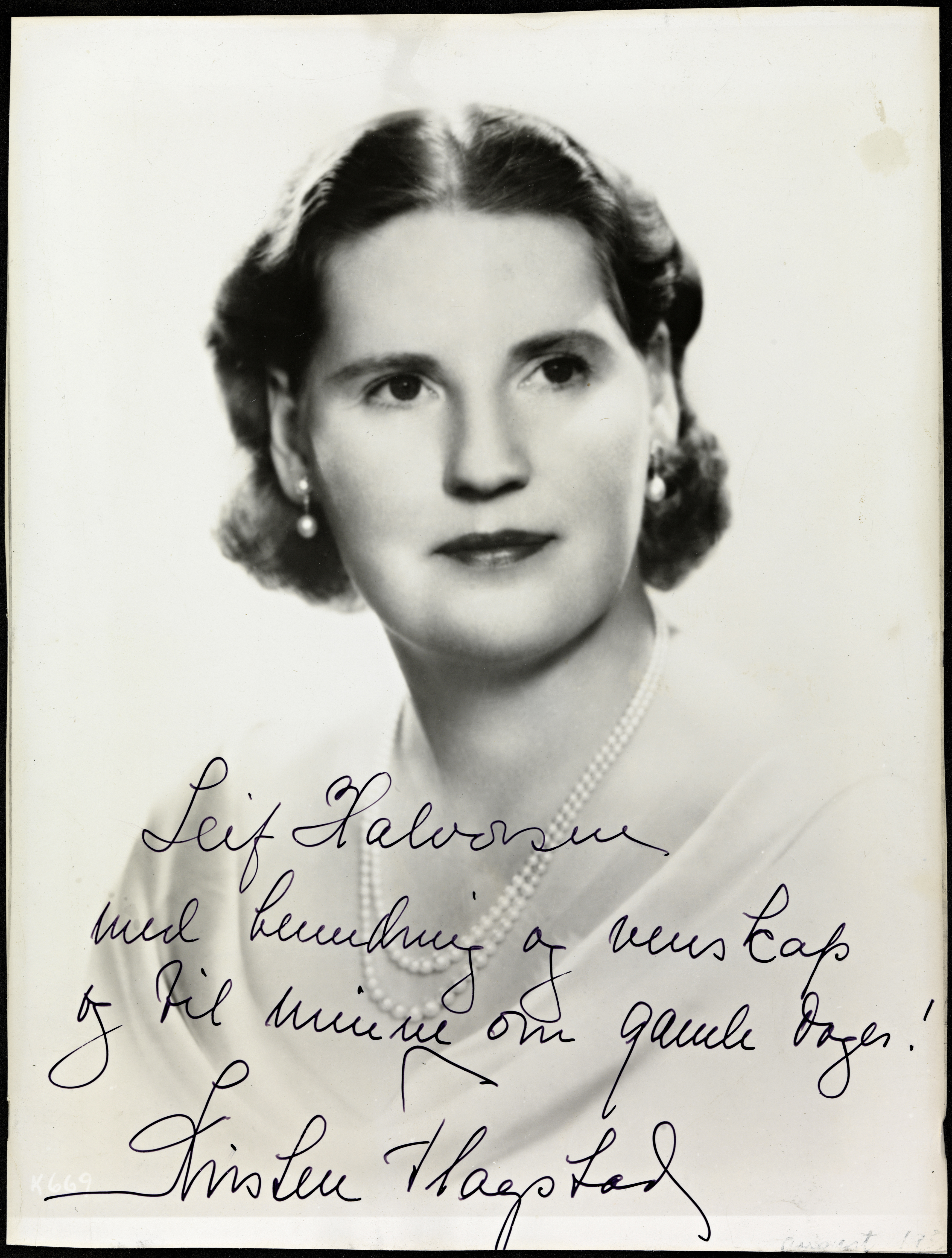 Tittel / Title: Portrett av Kirsten Flagstad Beskrivelse / Description: Dedikasjon på bildet: "Leif Halvorsen med beundring og venskap og til minne om galme dager! Kirsten Flagstad" Dato / Date: ca 1940-45 Fotograf / Photographer: ukjent / unknown Eier / Owner Institution: Nasjonalbiblioteket / National Library of Norway Lenke / Link: Bildesignatur / Image Number: blds_05688_b